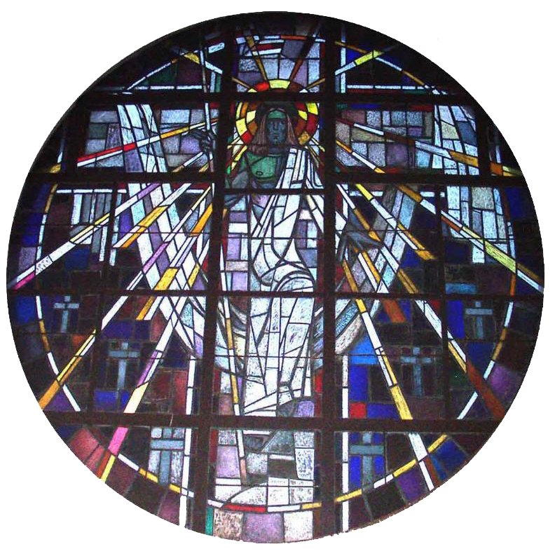 1955. St. Bonifaz. Röthenbach.Orgelrosette Alfons Abel (1908–1994) DescriptionGerman stained-glass artist, painter and aquarellistDate of birth/death 19 January 1908 28 June 1994Location of birth/death Nuremberg NurembergWork location Nuremberg (1925), Munich (1928-1929), Berlin (1929-1931), Nuremberg (1931-....), Sofia (1934), Crete (1942-1946), Egypt, Cairo, Nuremberg (1947-1994), GreeceAuthority control : Q1636988 VIAF: 695148814287645330004 GND: 1126121169 creator QS:P170,Q1636988